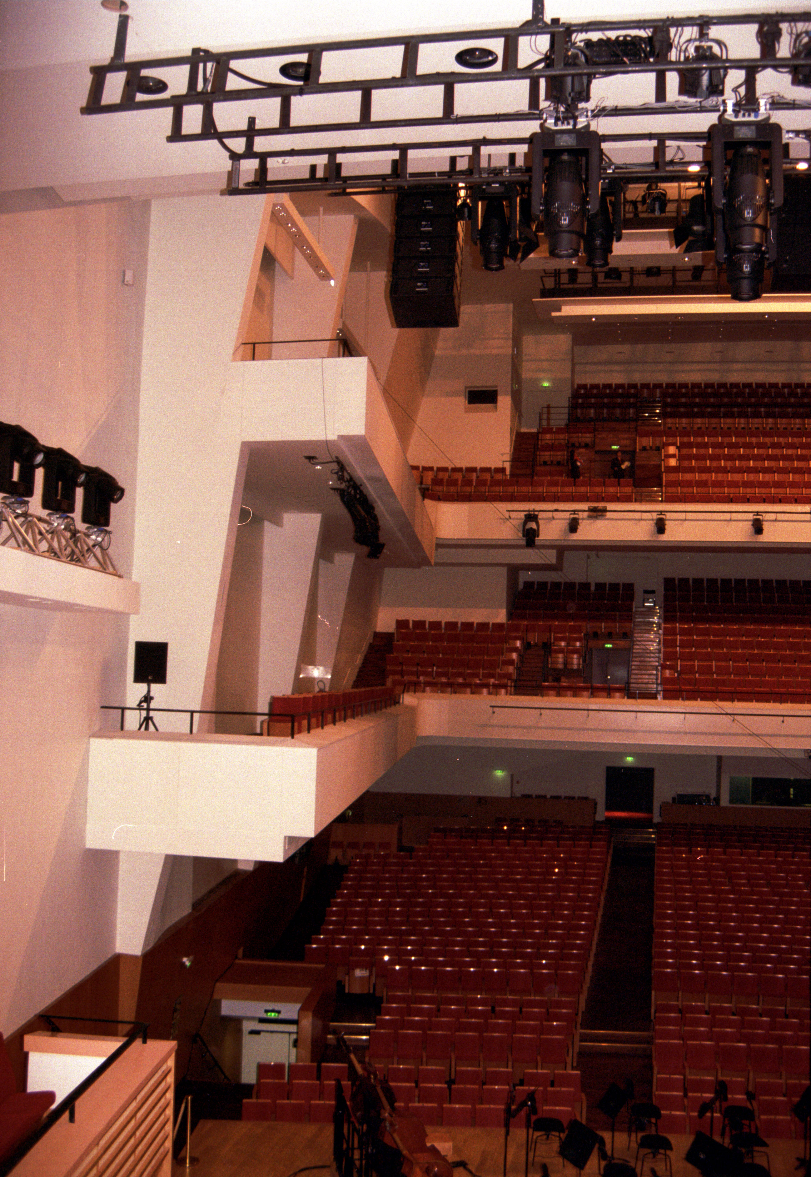 Salle Pleyel, Paris.